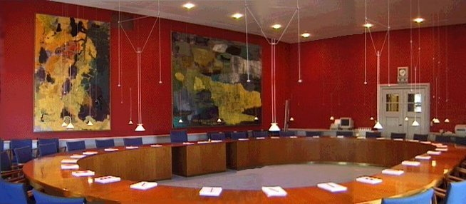 Folketinget. Udenrigspolitisk Nævns mødelokale